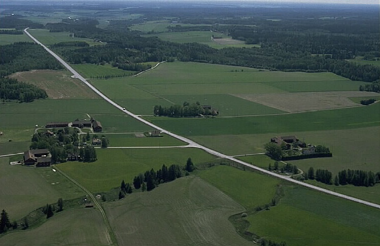 Motiv: Sör Hårsbäck Nyckelord: Flygbilder, Riksintressen Kategori: Miljöer, OdlingslandskapSör Hårsbäck